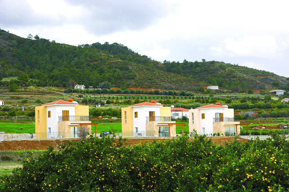 Argaka Bay Villas